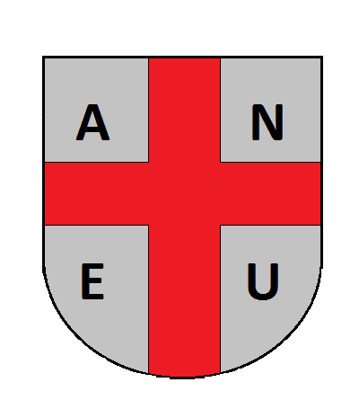 Escut municipal antic d'Esterri d'Àneu (Pallars Sobirà)